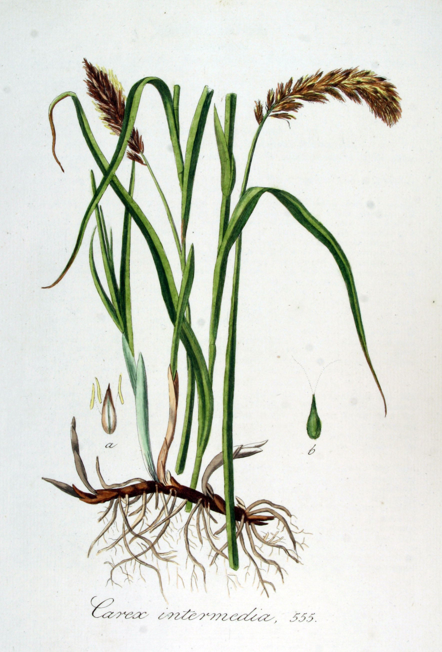 Carex disticha Huds. (Syn. Carex intermedia Good.)